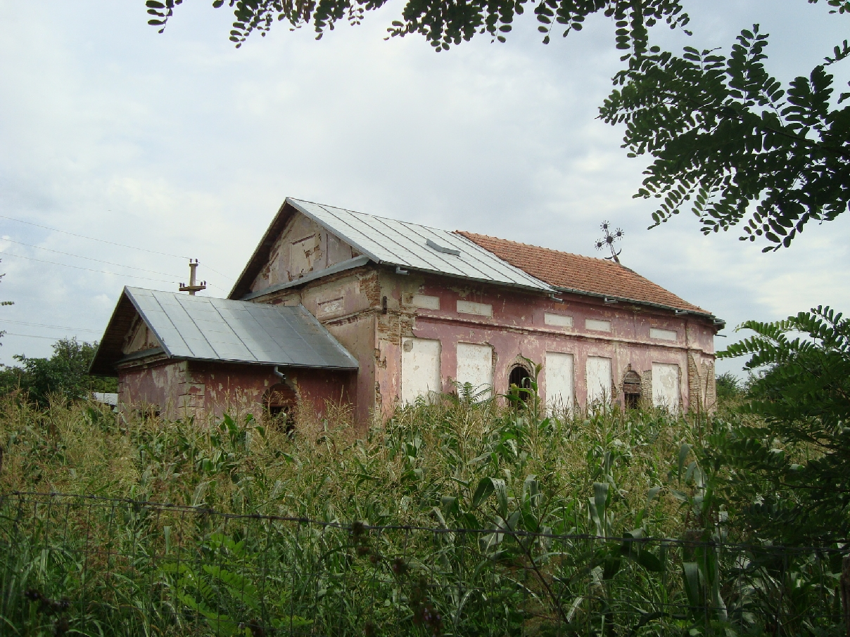 Biserica parasita Luica CL